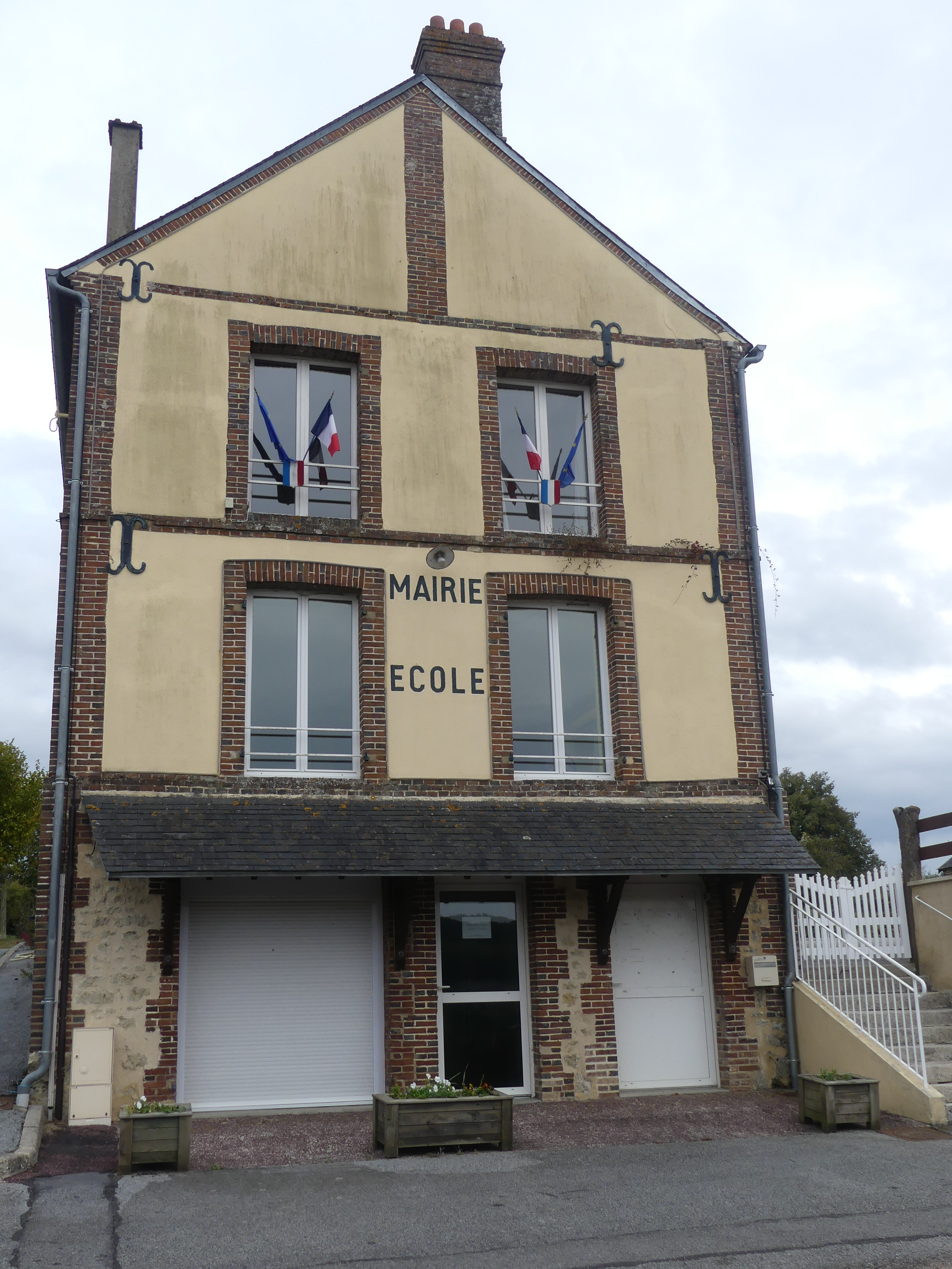 Mairie ancienne école